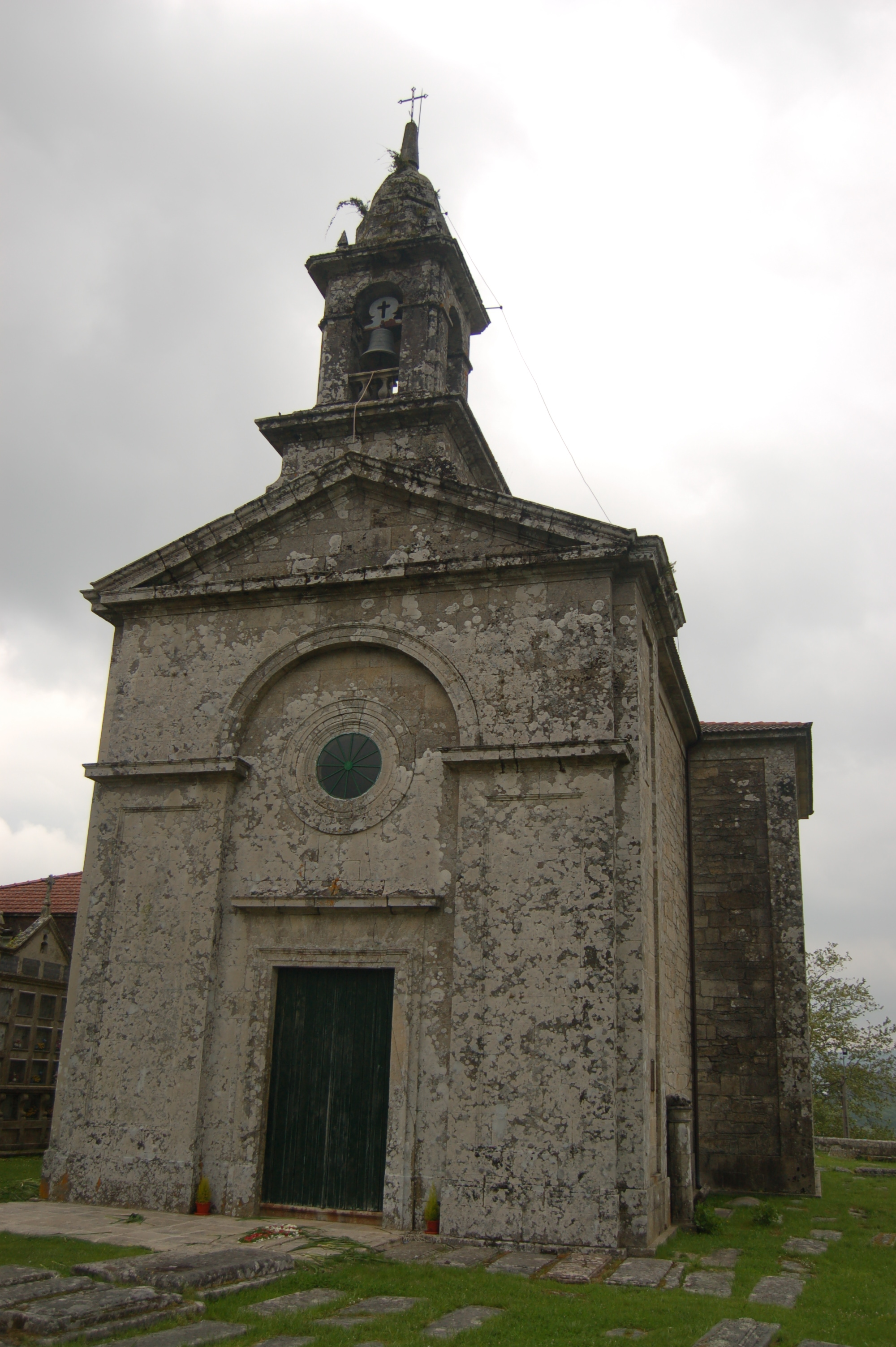 Igrexa parroquial de San Miguel de Arca (A Estrada)